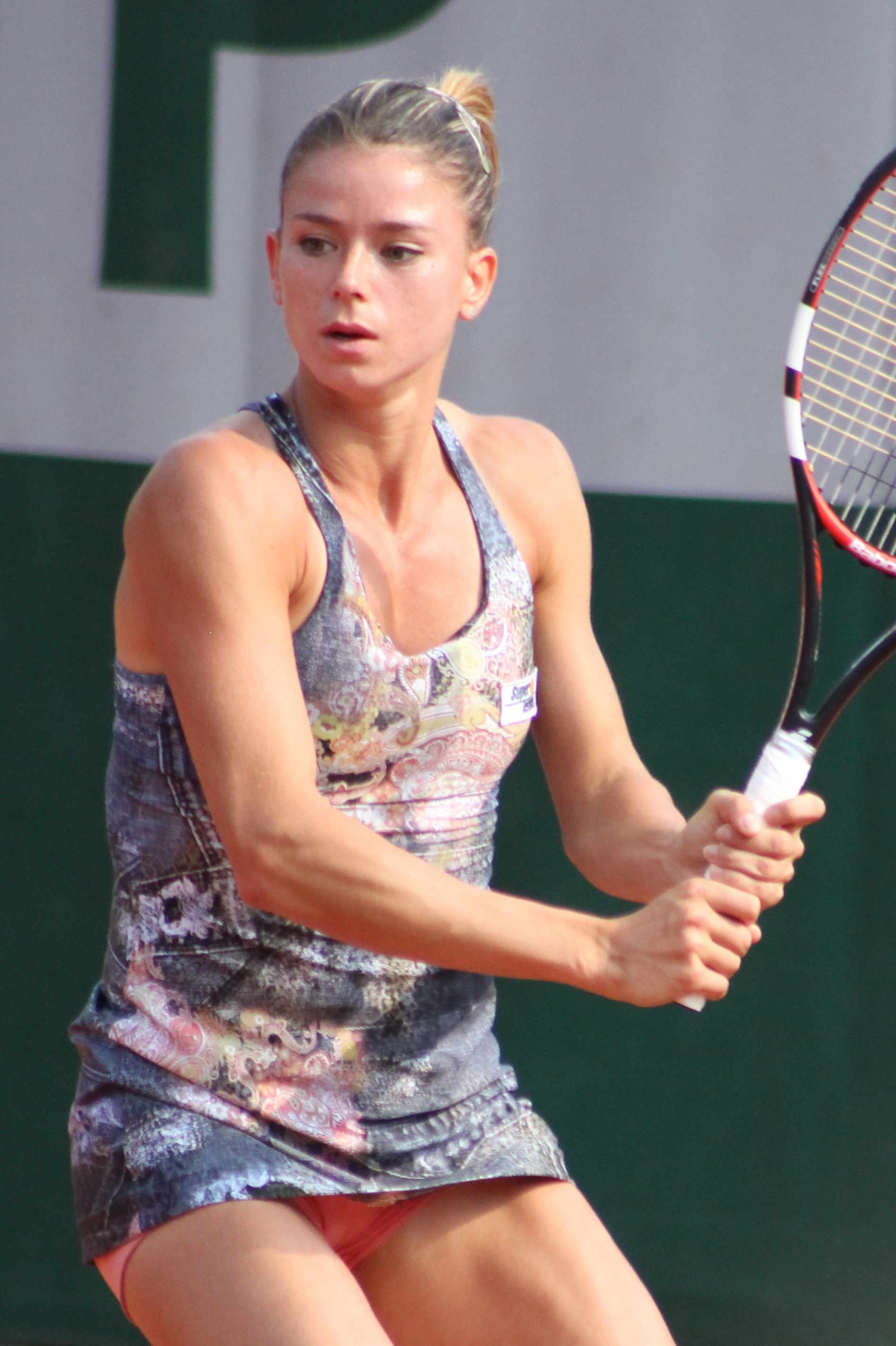 Giorgi RG15 (14)